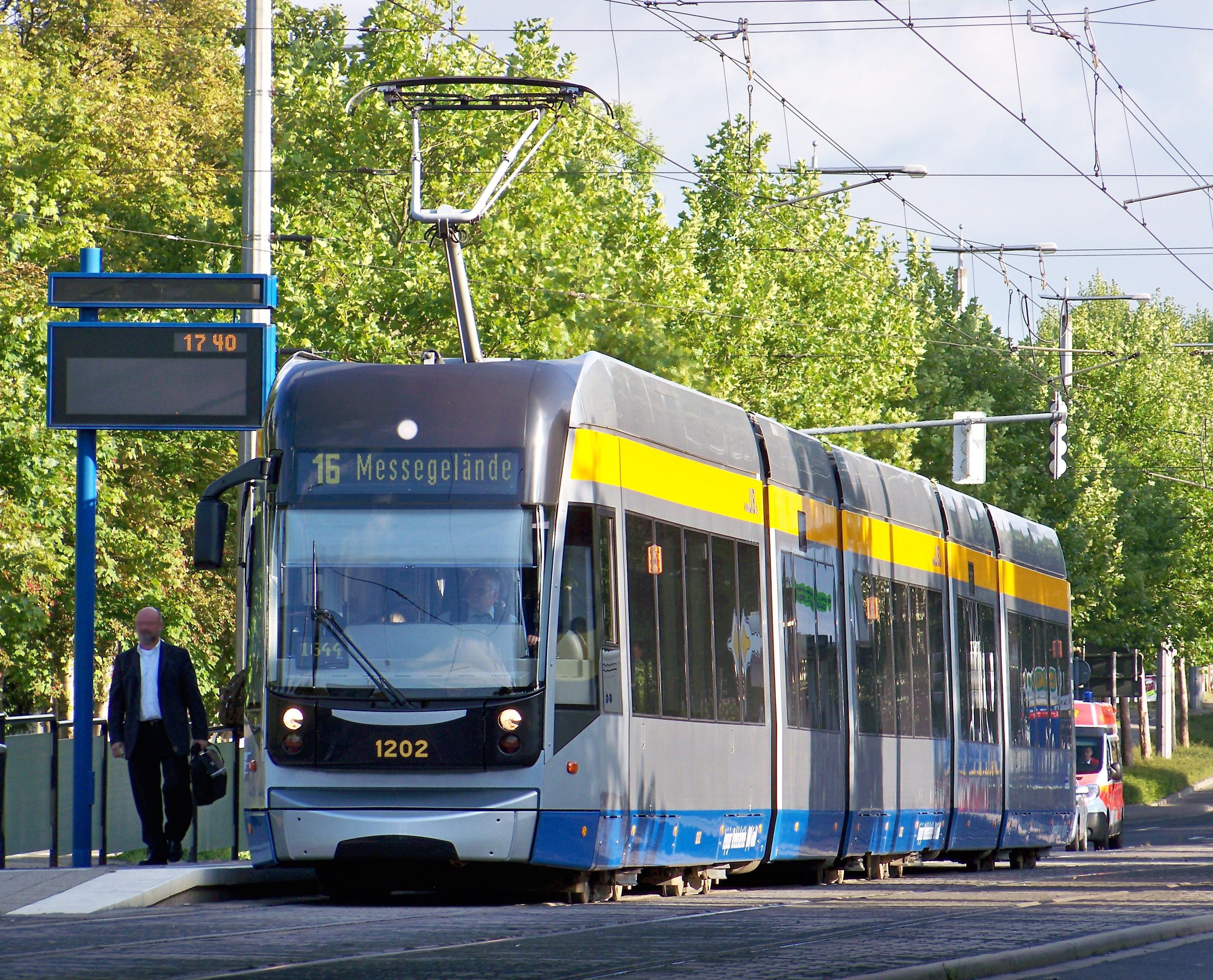 Niederflurstraßenbahn (Typ NGT12-LEI) der Leipziger Verkehrsbetriebe auf der Linie 16 (Lößnig–Messegelände) an der Haltestelle Klinikum Stankt Georg